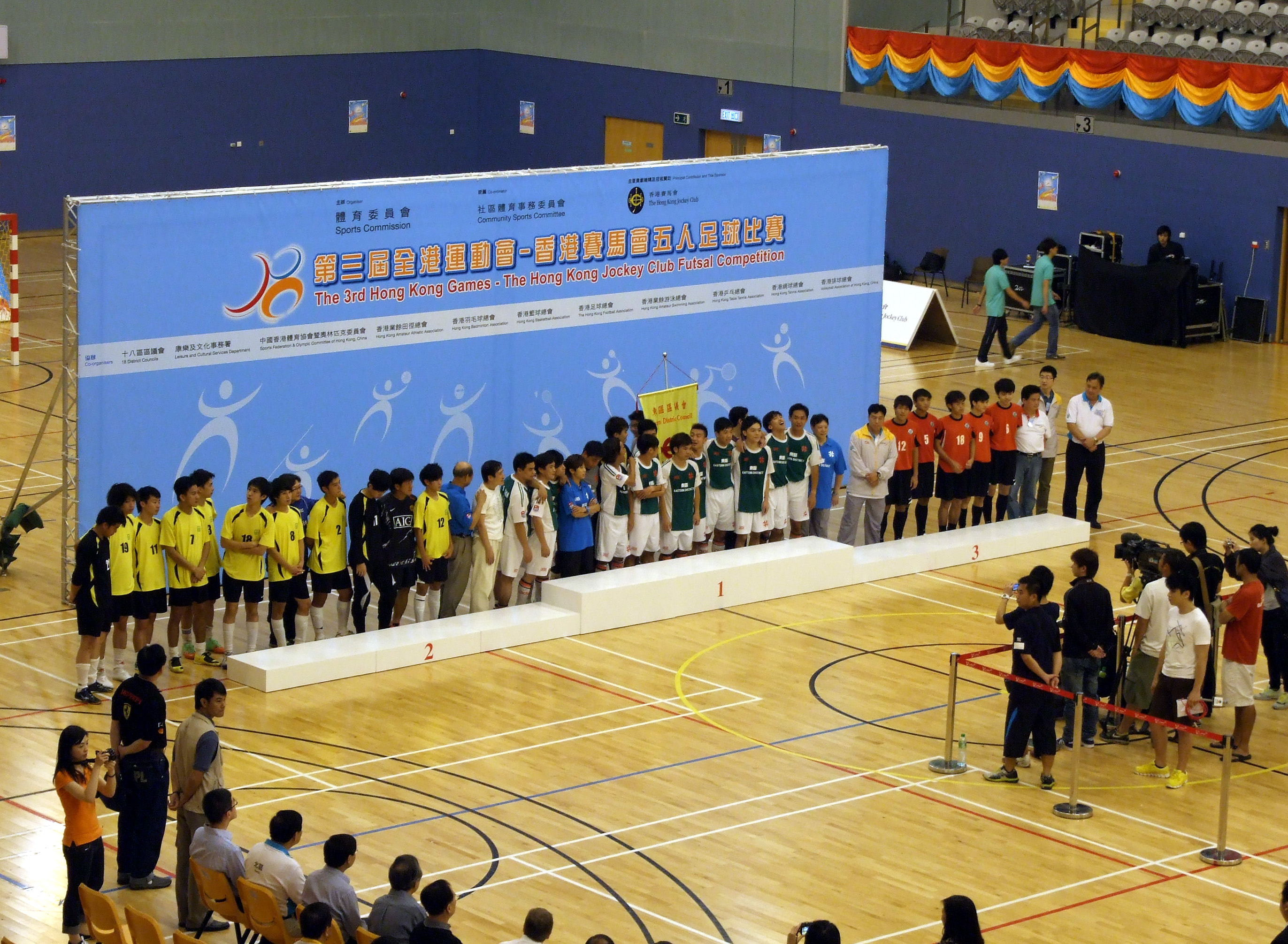 中文（香港）: 2011年全港運動會五人足球比賽三甲球隊